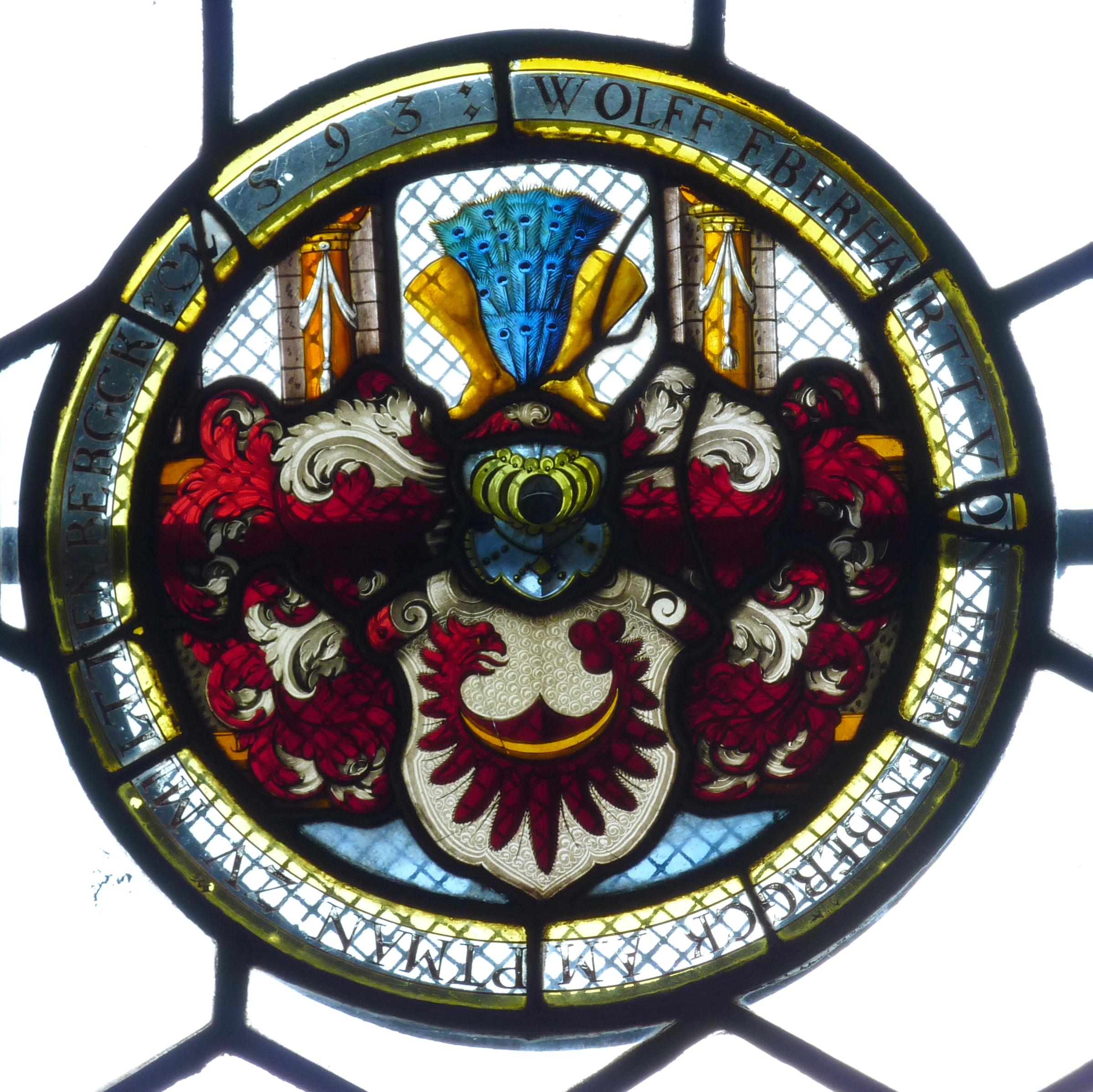 Rathaus in Bürgstadt im Landkreis Miltenberg (Bayern, Deutschland), Wappenscheibe im Sitzungssaal für Wolff Eberhard von Ehrenberg